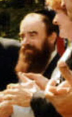 Abraham Shemtov